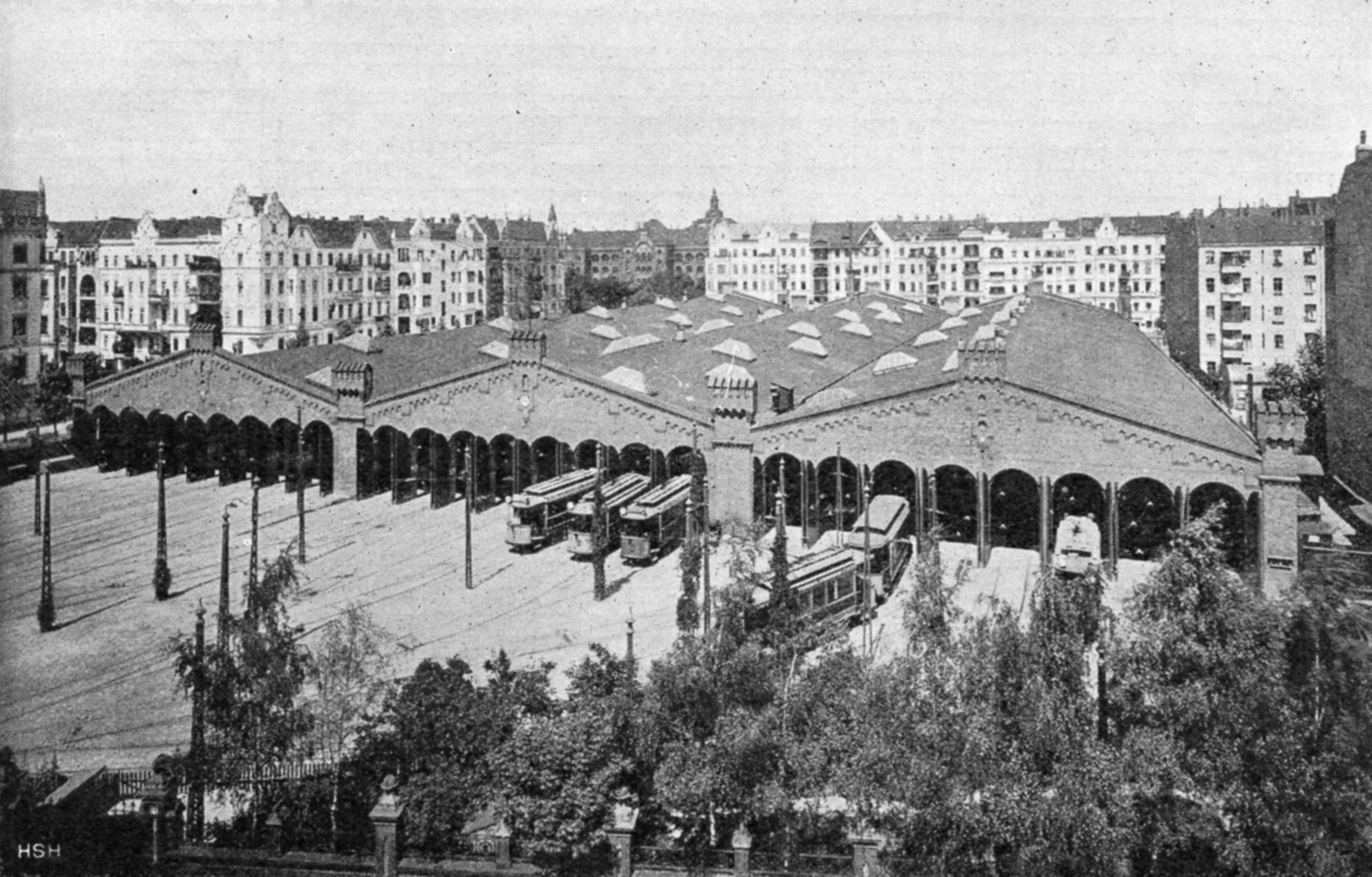 Straßenbahnbetriebshof der Großen Berliner Straßenbahn an der Belziger Straße in Schöneberg (Berlin)